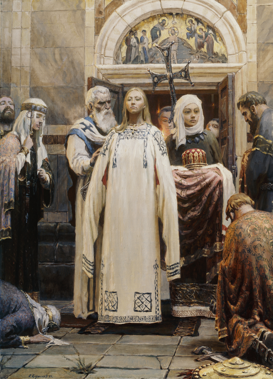 Сергей Кириллов. «Княгиня Ольга (Крещение). Первая часть трилогии «Святая Русь». 1993. Х.м. 140x100